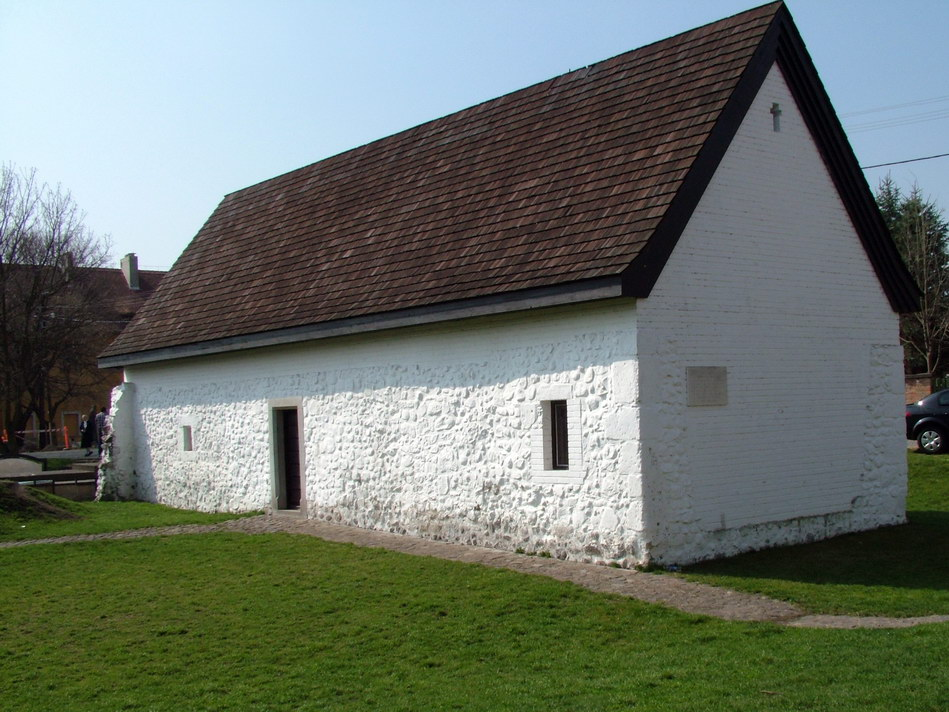 Pásztó - Oskolamester háza